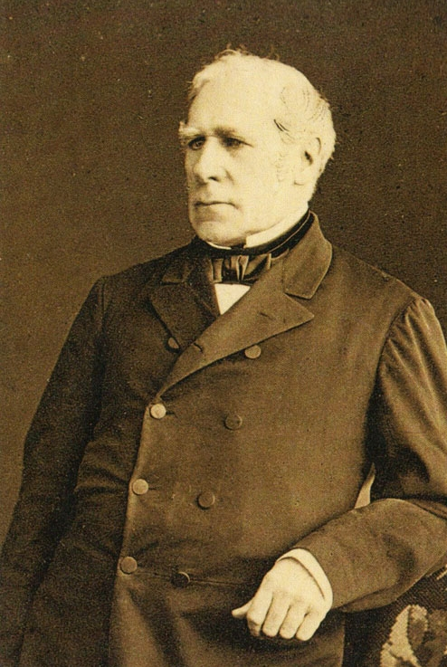 Дашков, Яков Андреевич